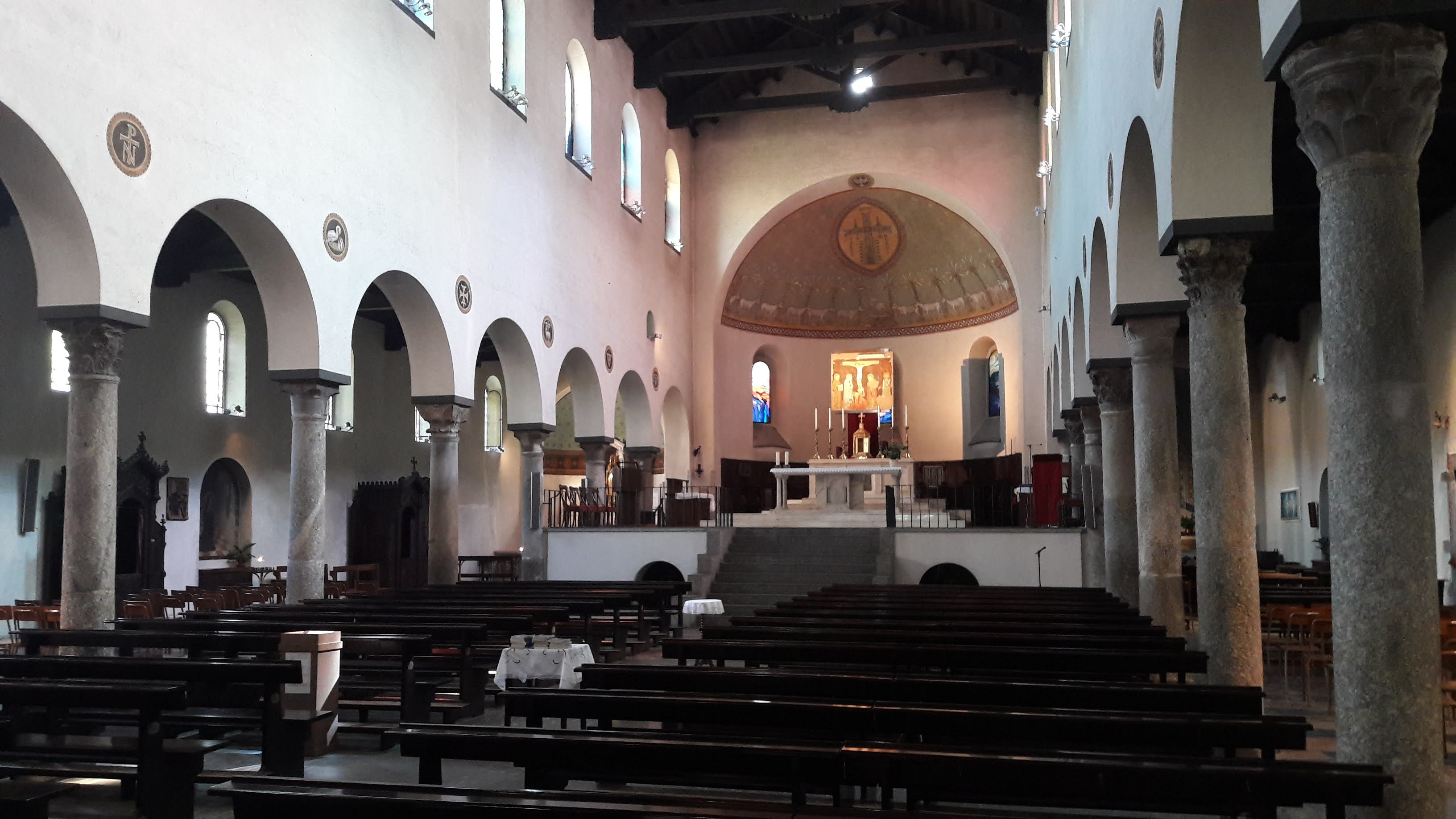 San Vincenzo in Prato (Milan) - Nef